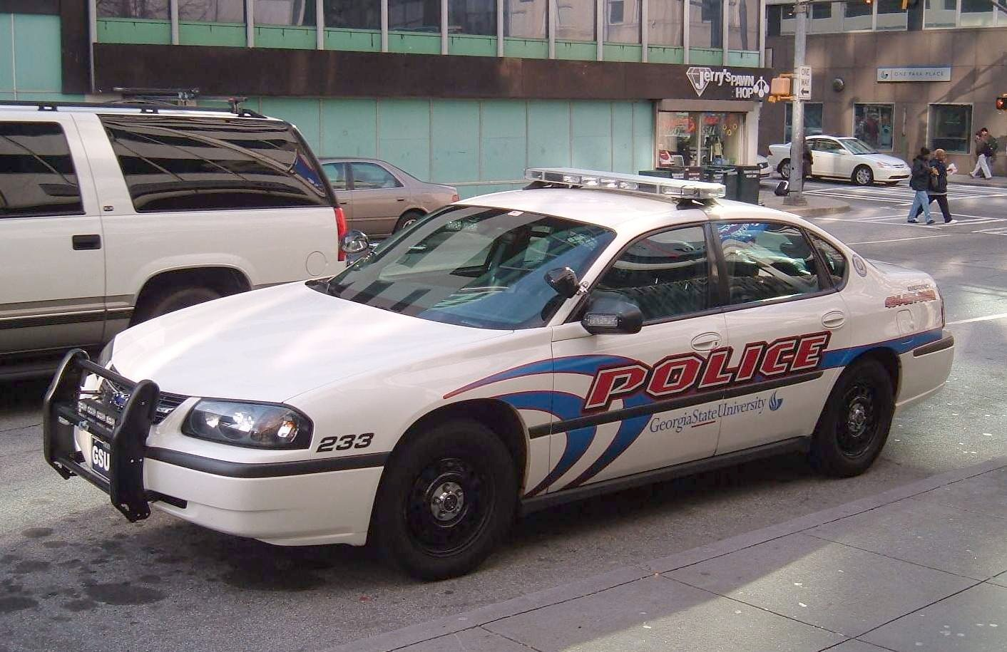 Chevrolet Impala